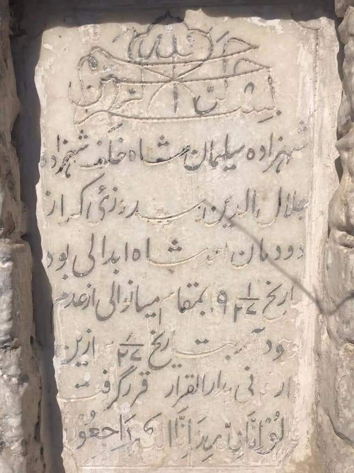 شہزادہ سلیمان شاہ جو کہ شہزادہ جلال الدین سدوزئی کا بیٹا تھا. 19 جنوری 1727ء کو پیدا ہوئے اور 2 اگست 1727ء کو بیمار ہو کر وفات پا گئے. شہزادہ جلال الدین سدوزئی احمد شاہ ابدالی کا سوتیلا ماموں تھا. احمد شاہ ابدالی کے والد شاہ زمان خان نے جلال الدین سدوزئی کی سوتیلی ہمشیرہ زرغونہ سے شادی کی تھی. شہزادہ جلال الدین سدوزئی افغانستان کے علاقے صفا کے سابق حاکم شاہ حسین کا منہ بولا بیٹا تھا.